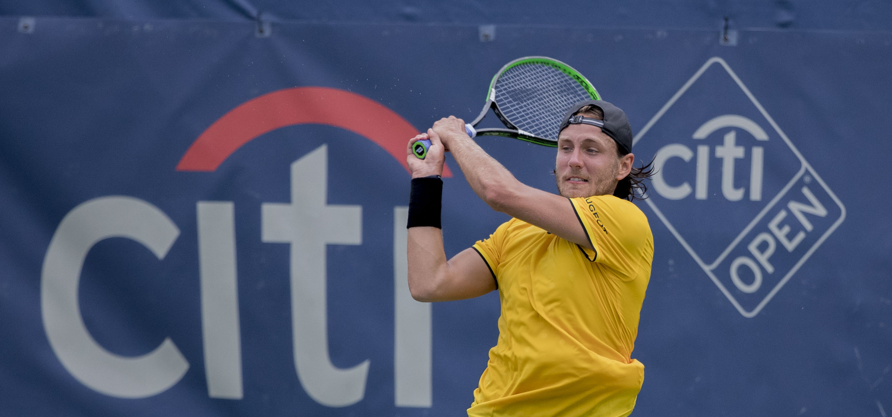 Citi Open Tennis 2017